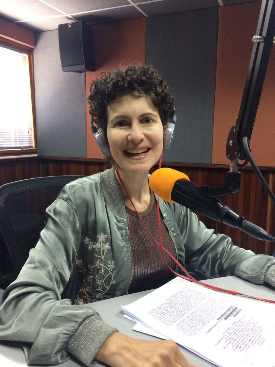 Anna Vaccarella en Unión Radio